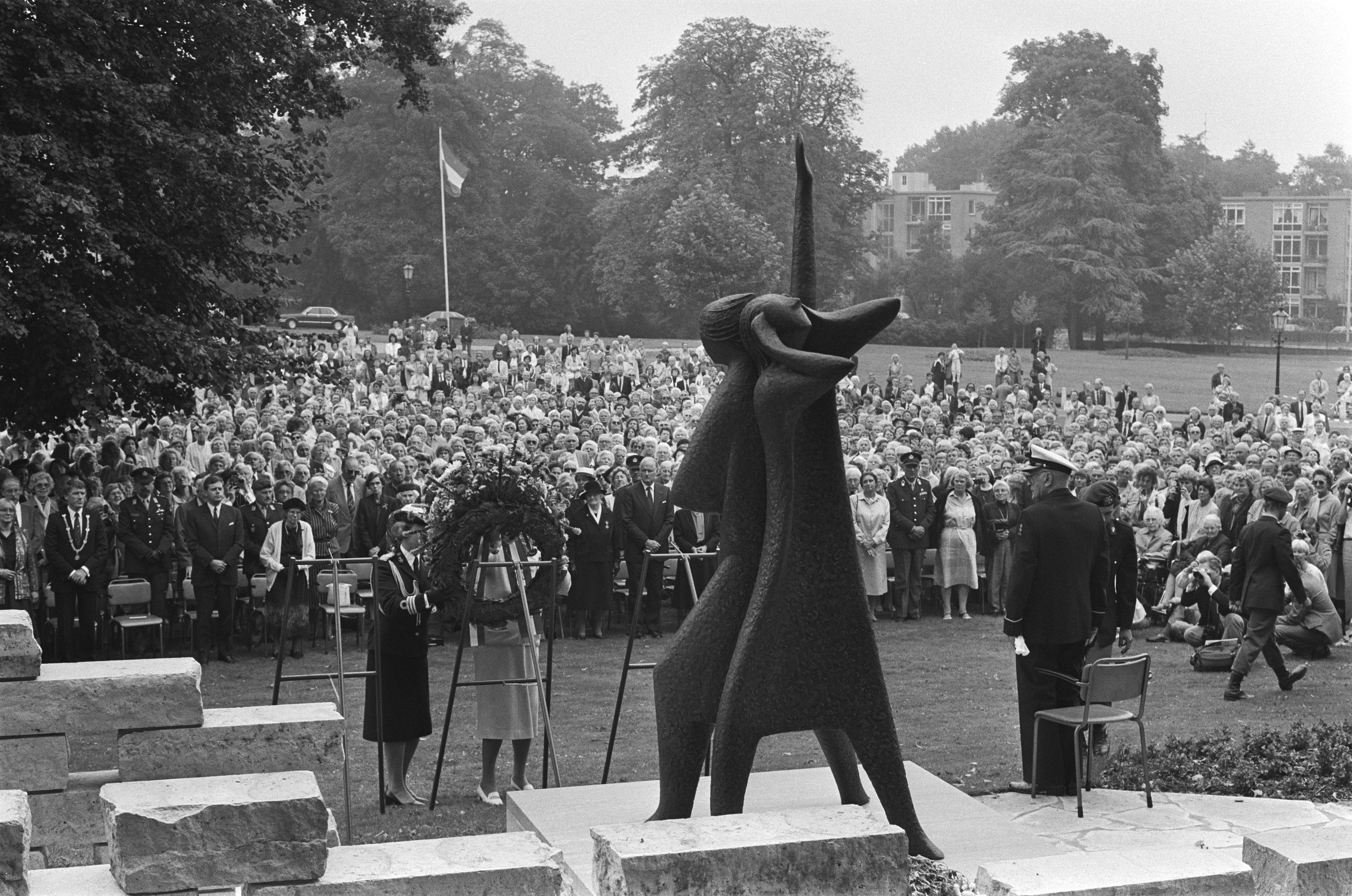 Collectie / Archief : Fotocollectie Anefo Reportage / Serie : [ onbekend ] Beschrijving : Prinses Juliana legt krans bij monument in Bronbeek t.g. herdenking Nederlandse slachtoffers Japanse vrouwenkampen: prinses Juliana en mevrouw Van Kempen Annotatie : De ontwerper van het beeld is Frank Nix Datum : 31 augustus 1985 Trefwoorden : herdenkingen, koloniale monumenten Persoonsnaam : Juliana (prinses Nederland) Fotograaf : Croes, Rob C. / Anefo, [onbekend] Auteursrechthebbende : Nationaal Archief Materiaalsoort : Negatief (zwart/wit) Nummer archiefinventaris : bekijk toegang 2.24.01.05 Bestanddeelnummer : 933-4081